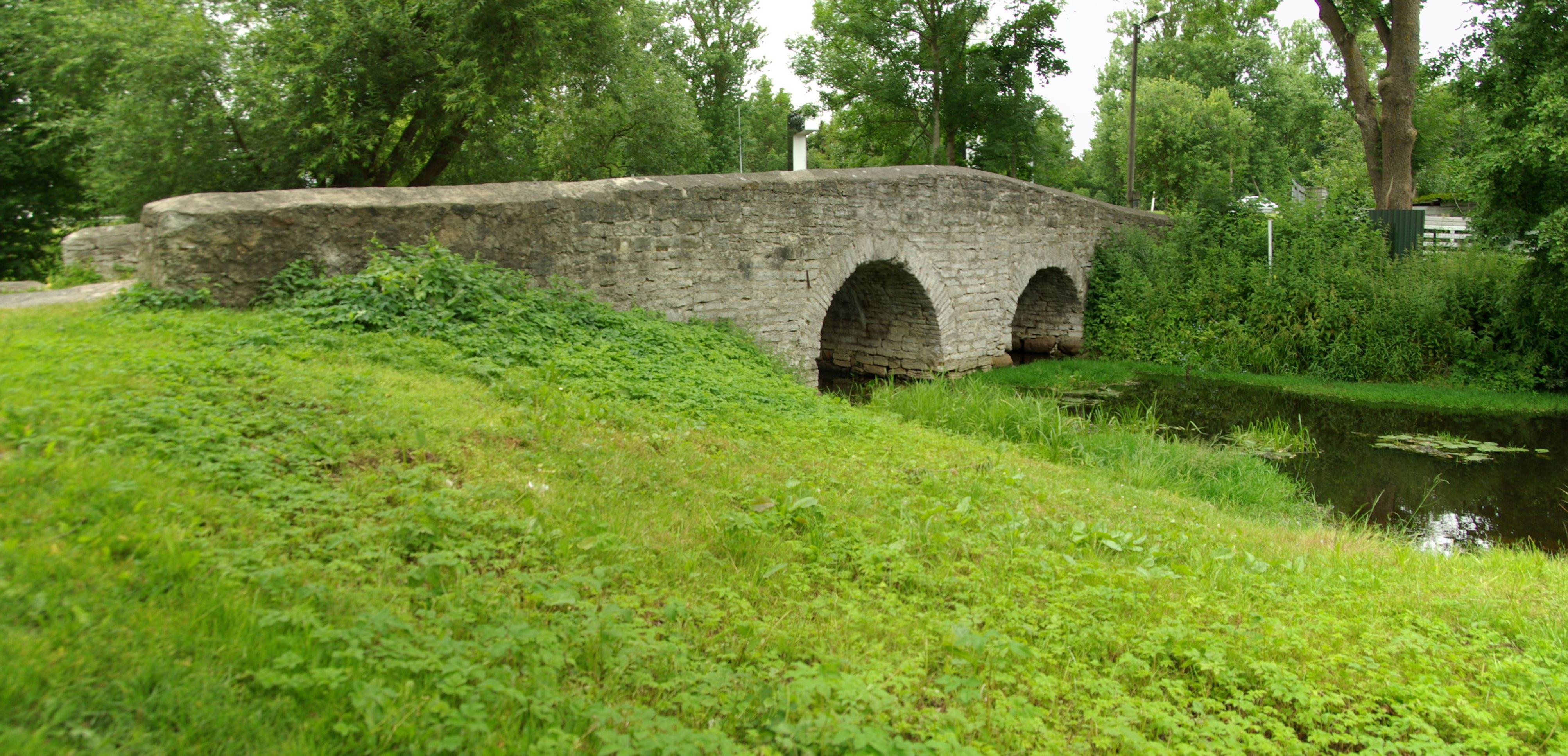 Kahevõlviline kivisild Pääskülas